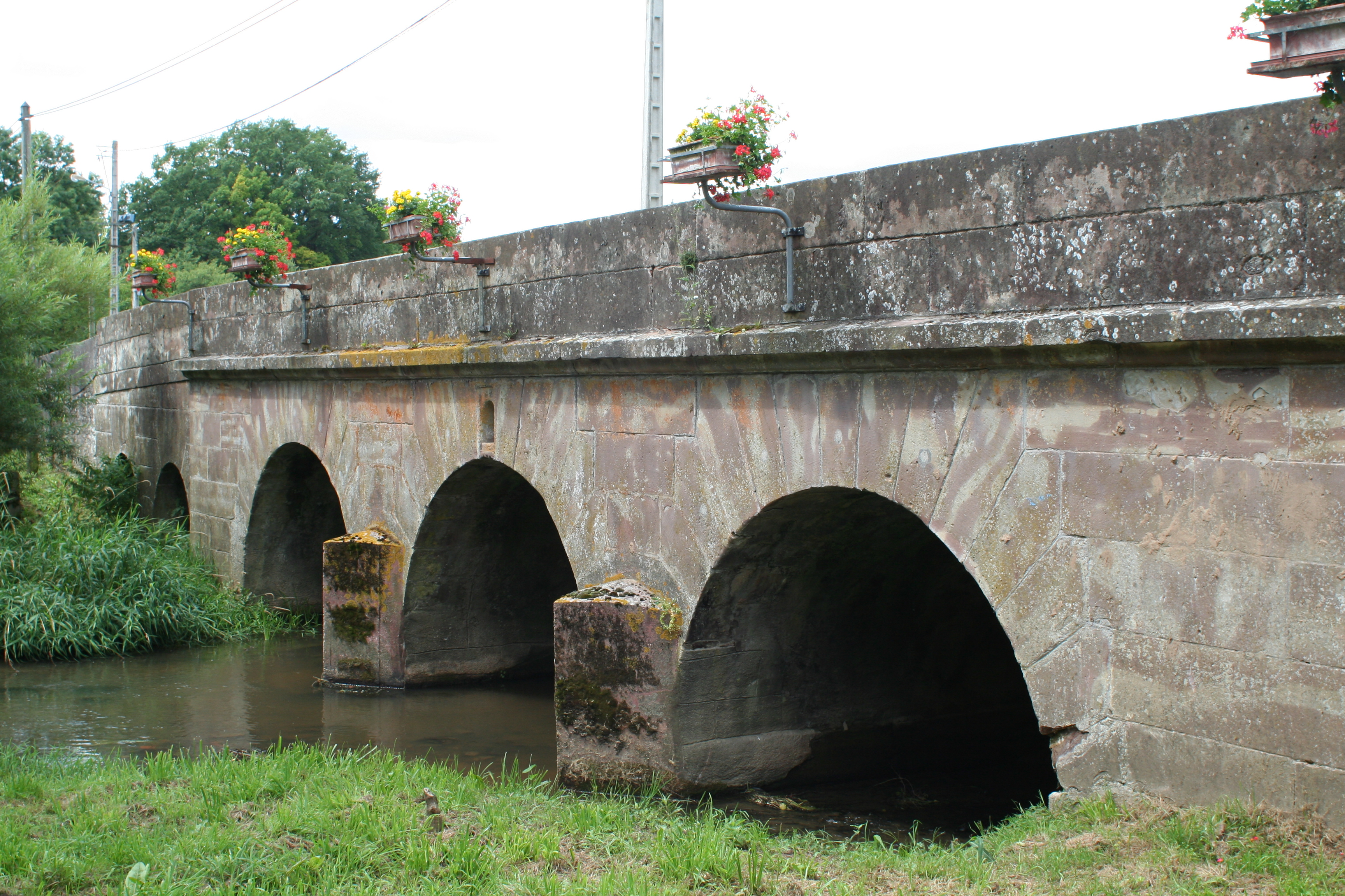 Pont sur la Belvite à Xaffévillers (Vosges)